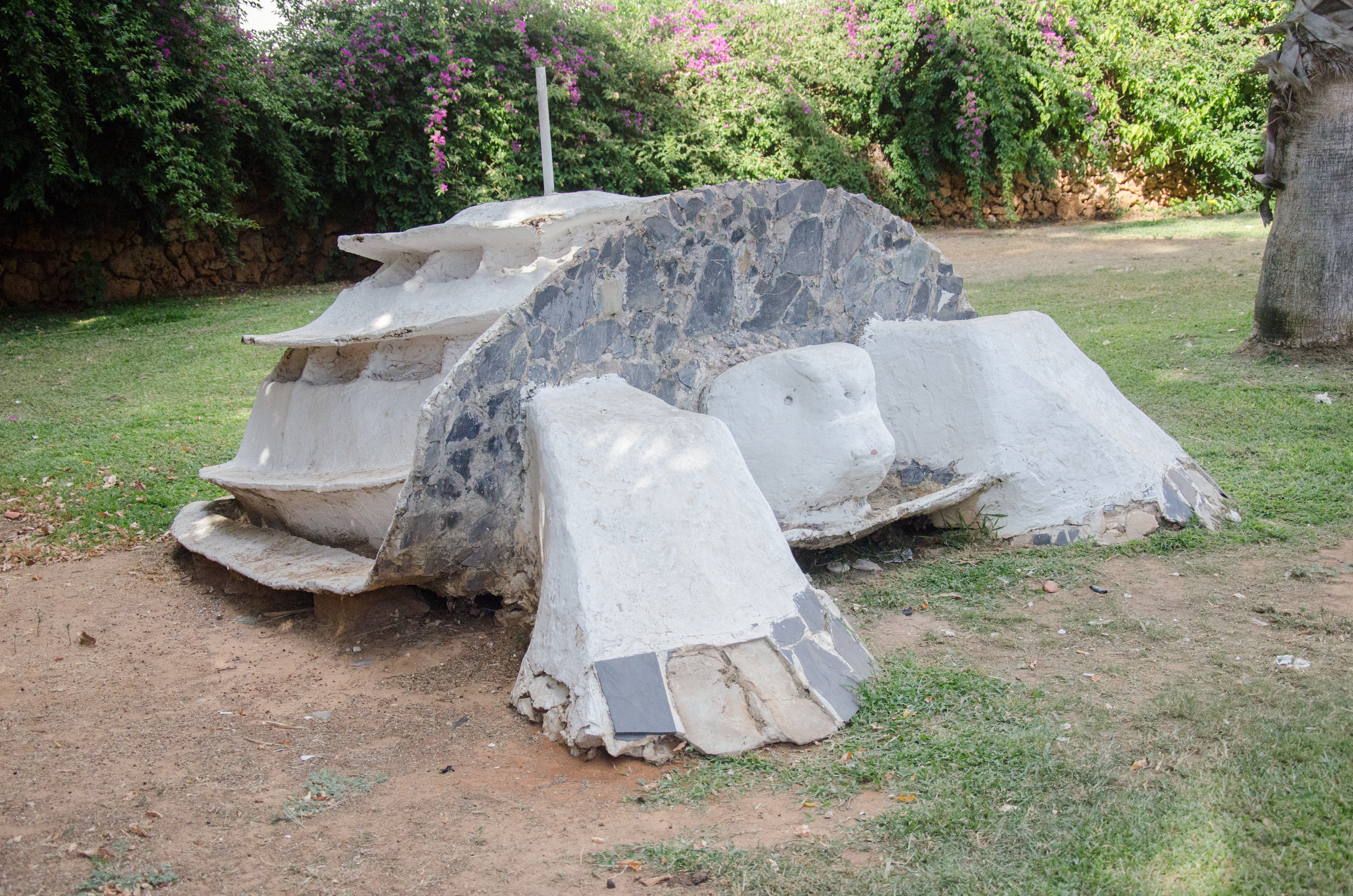 פסל בצורה של צב